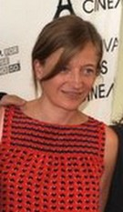 Aurélia Petit à une avant-première de À coeur ouvert.